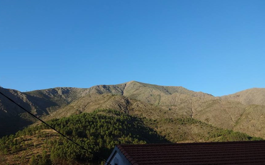 Paisaje en el término municipal de Casares de las Hurdes (provincia de Cáceres, España). Pico de La Corredera visto desde la alquería de Huetre.